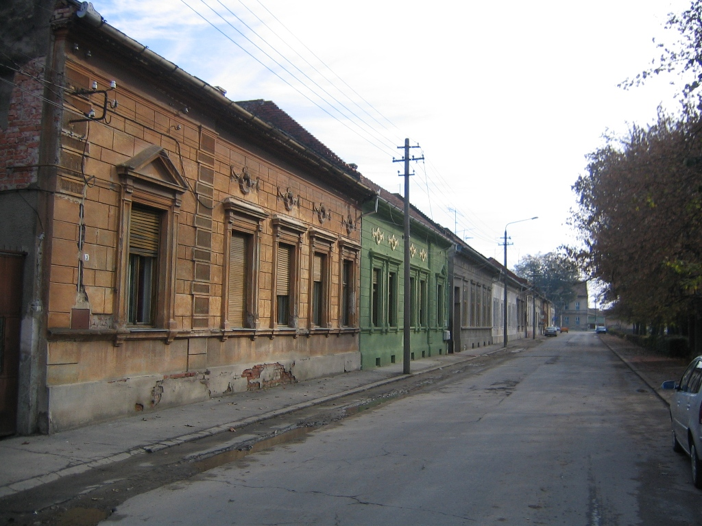 Street in Lugoj, Romania